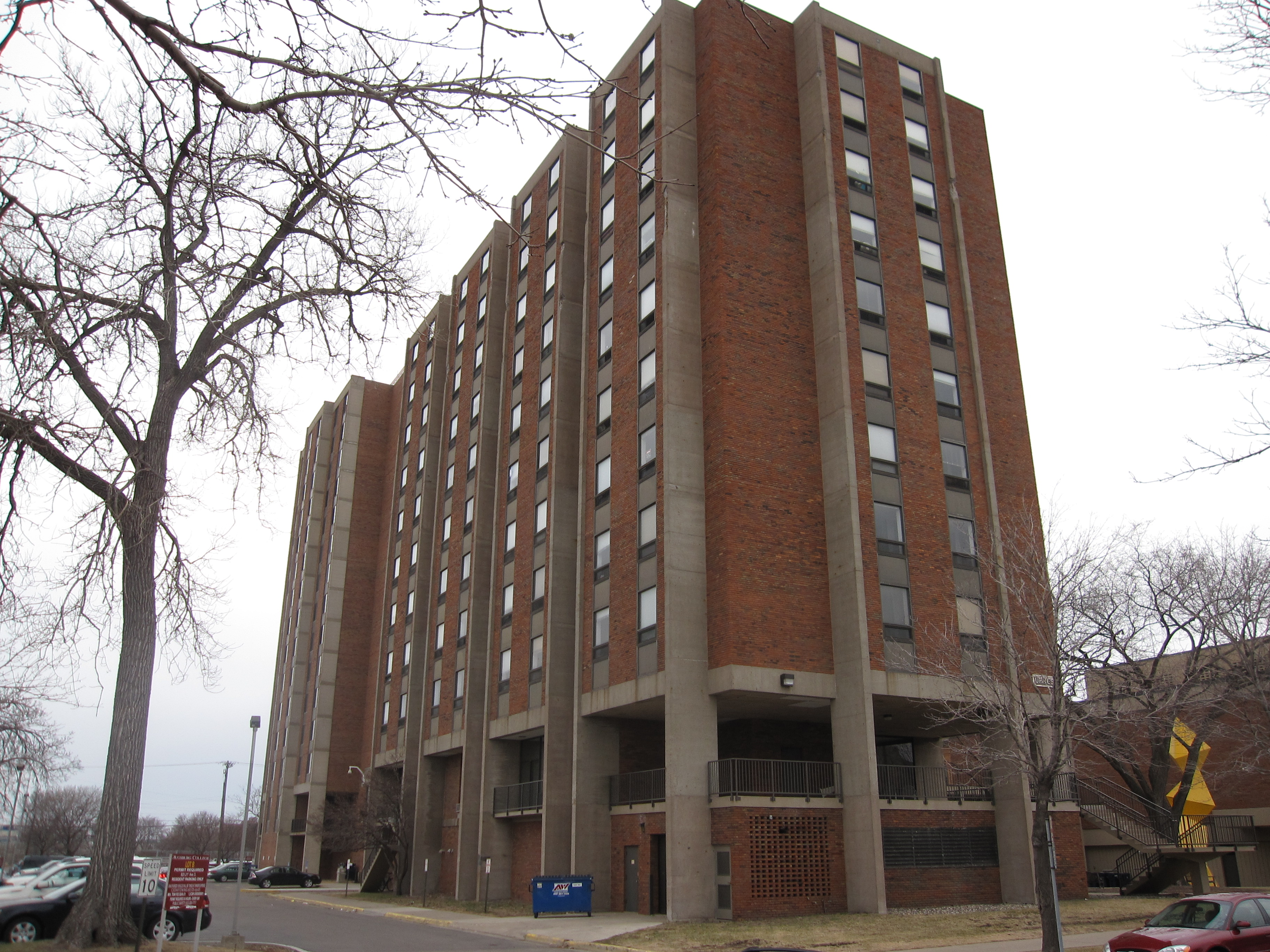 Augsburg Tower